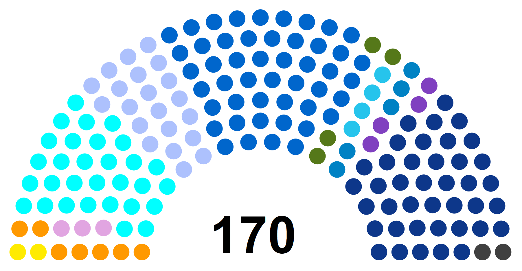 Partis politiques au conseil régional des Hauts-de-France en janvier 2020